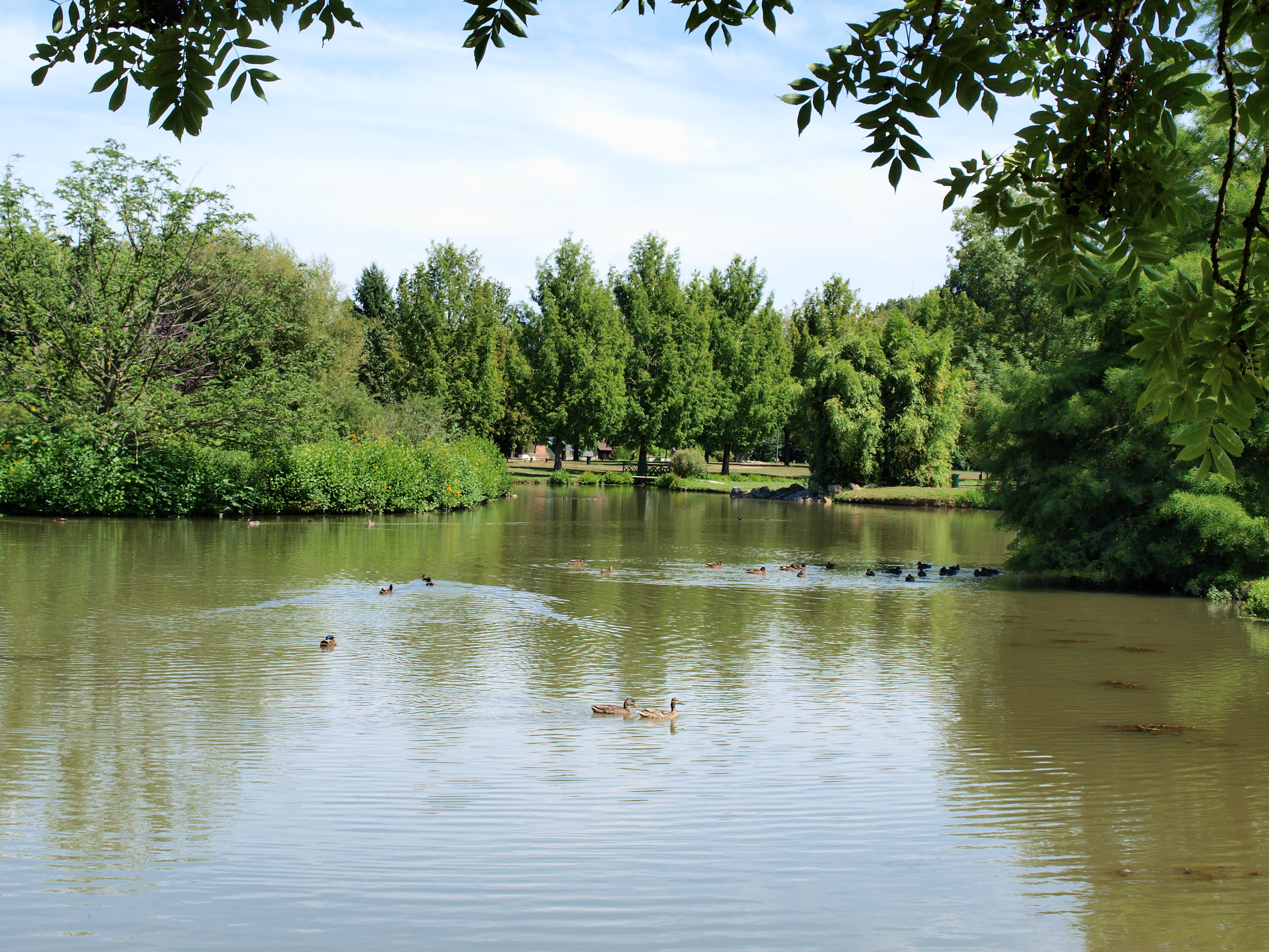 Bléneau (Yonne, France)